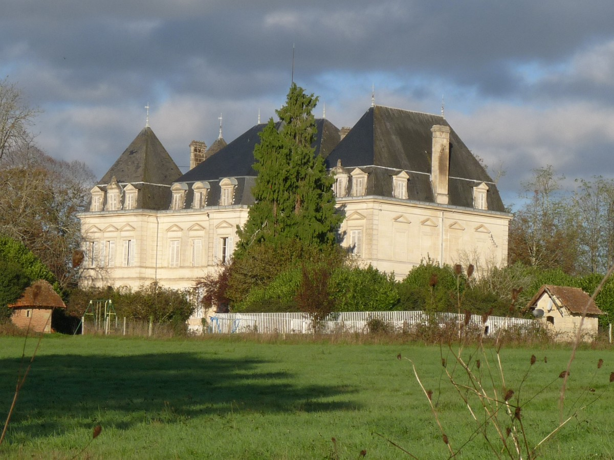 Château de l'Espie, Clérac, Charente-Maritime, France